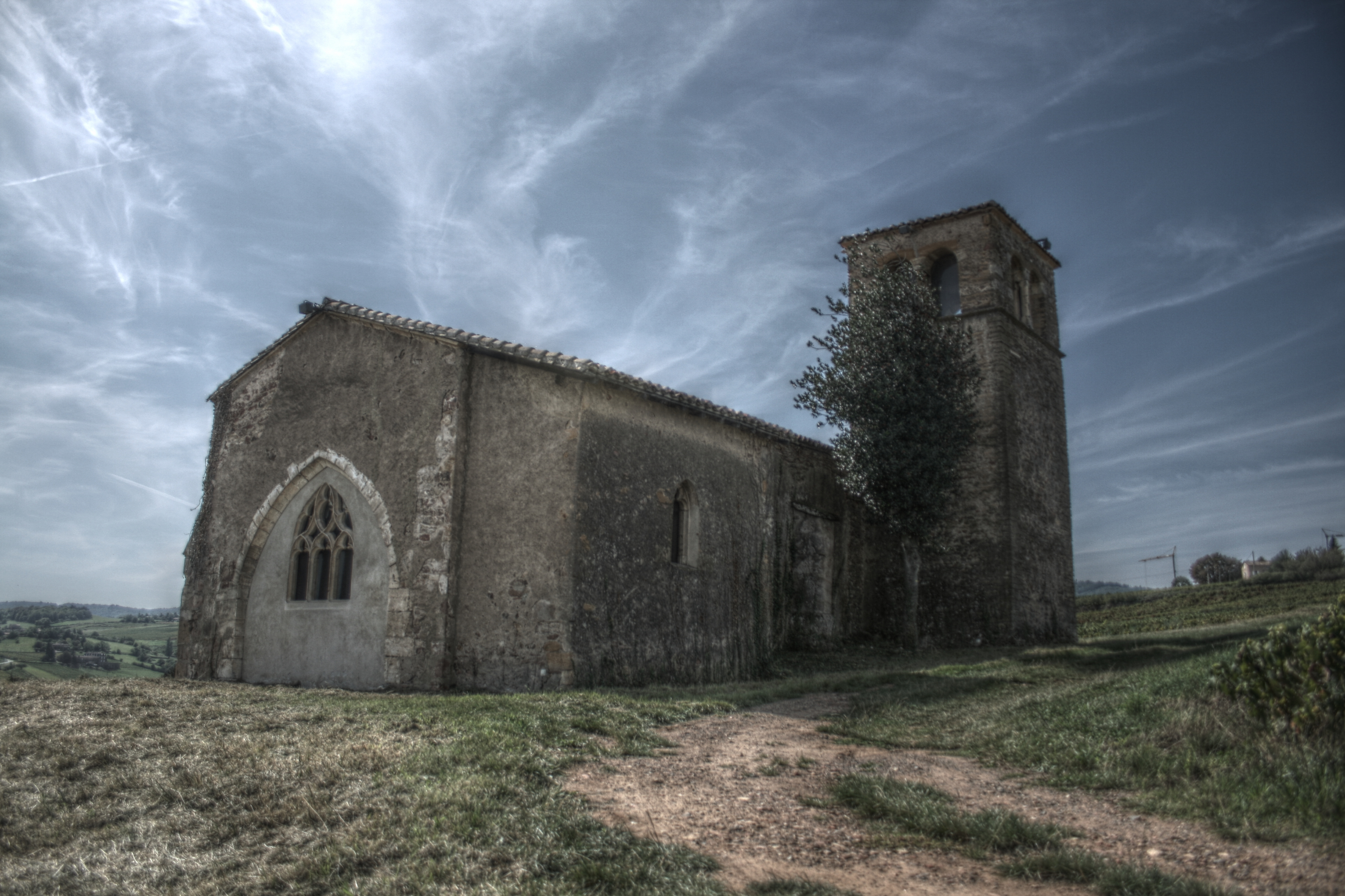 La Chapelle de Chevènes, située à Denicé, Rhône, France .